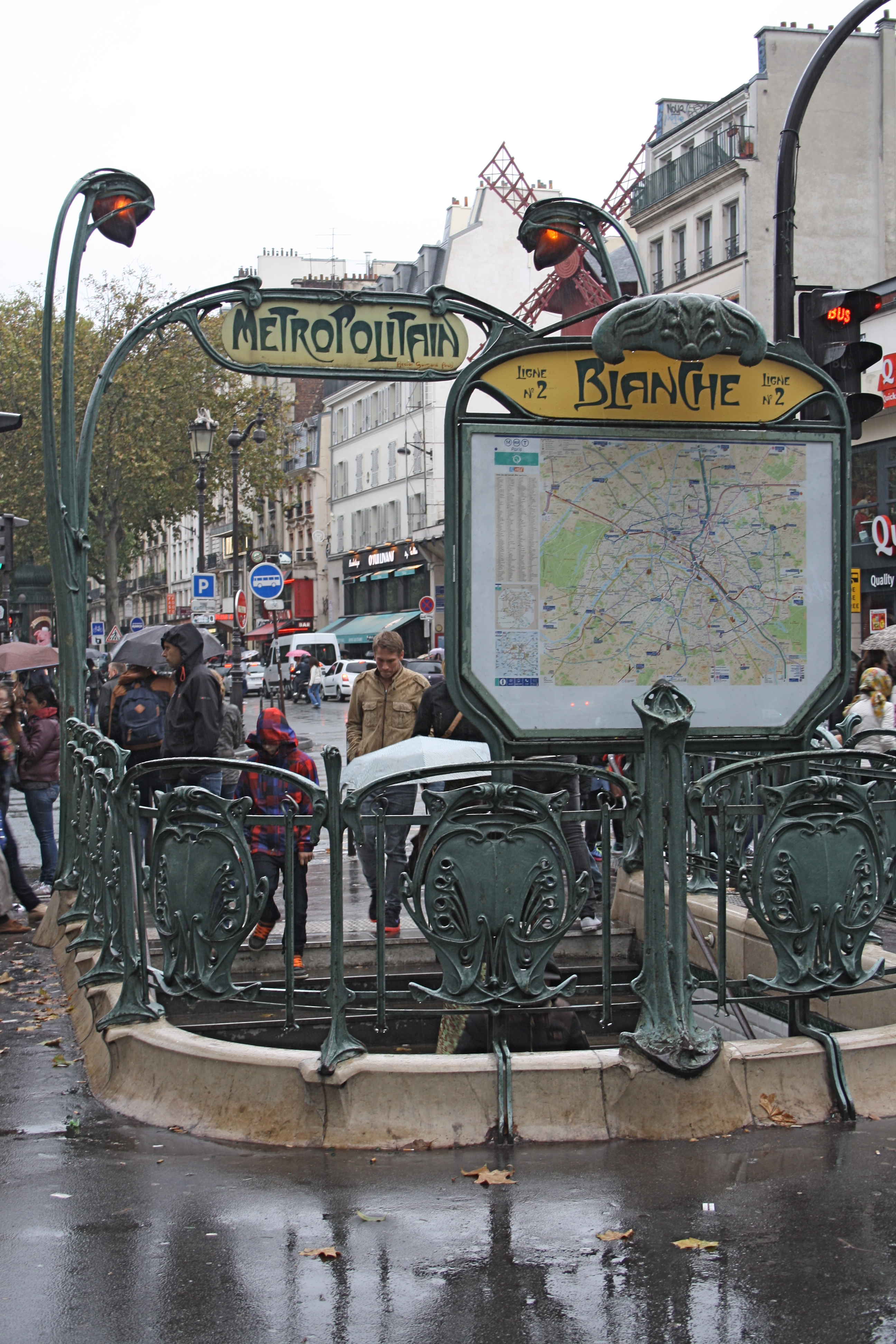 Zugang Metrostation Blanche Paris